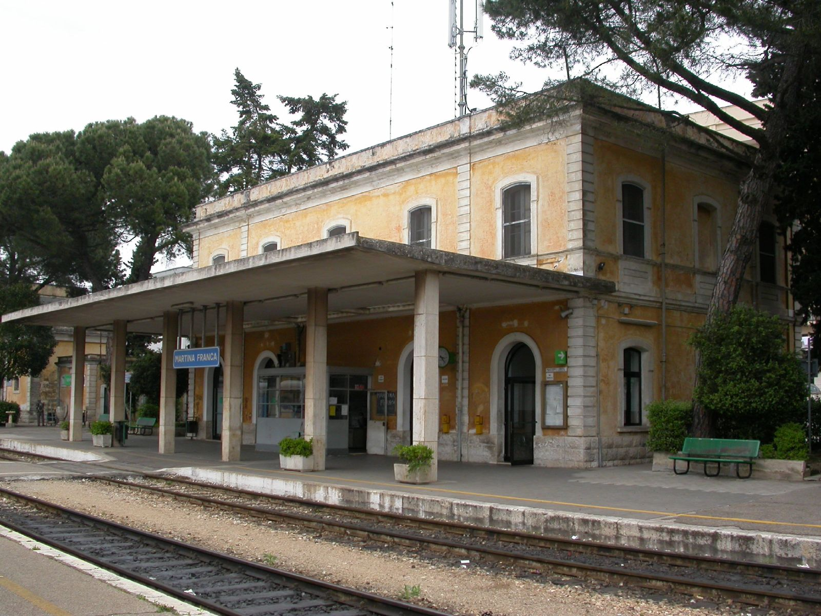 Stazione ferroviaria di Martina Franca